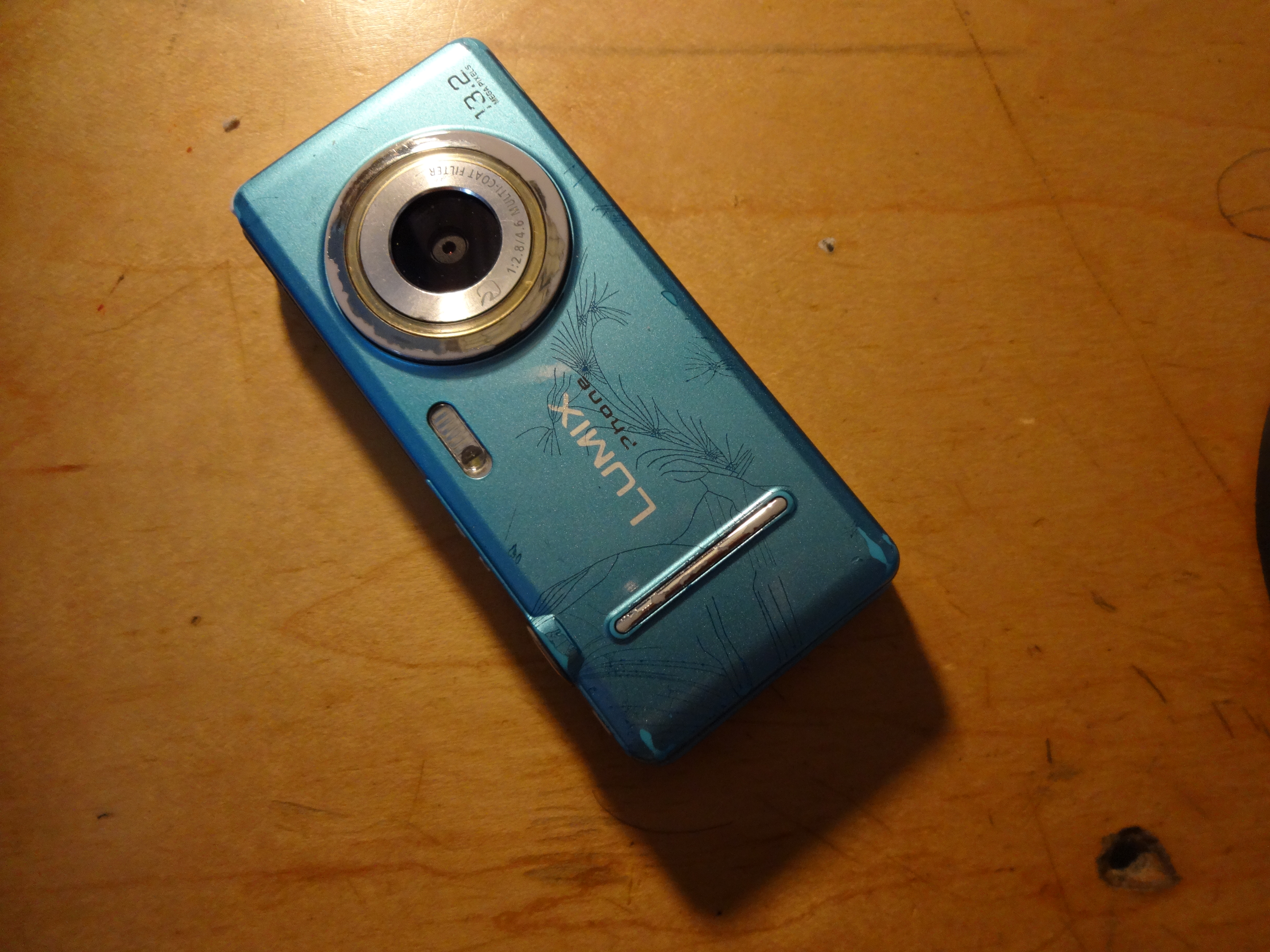 P-03C(同色)